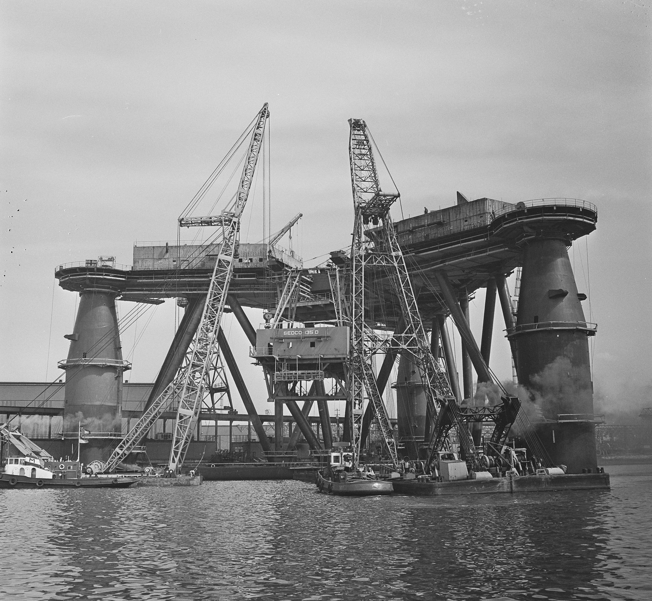 Collectie / Archief : Fotocollectie Anefo Reportage / Serie : [ onbekend ] Beschrijving : Hollands grootste bokken plaatsen fundatie op grootste booreiland Sedco 135D te Rotterdam Datum : 11 mei 1966 Locatie : Rotterdam, Zuid-Holland Trefwoorden : BOKKEN, Boorplatforms Persoonsnaam : Transworld Fotograaf : Voets, Jan / Anefo Auteursrechthebbende : Nationaal Archief Materiaalsoort : Negatief (zwart/wit) Nummer archiefinventaris : bekijk toegang 2.24.01.03 Bestanddeelnummer : 919-1353